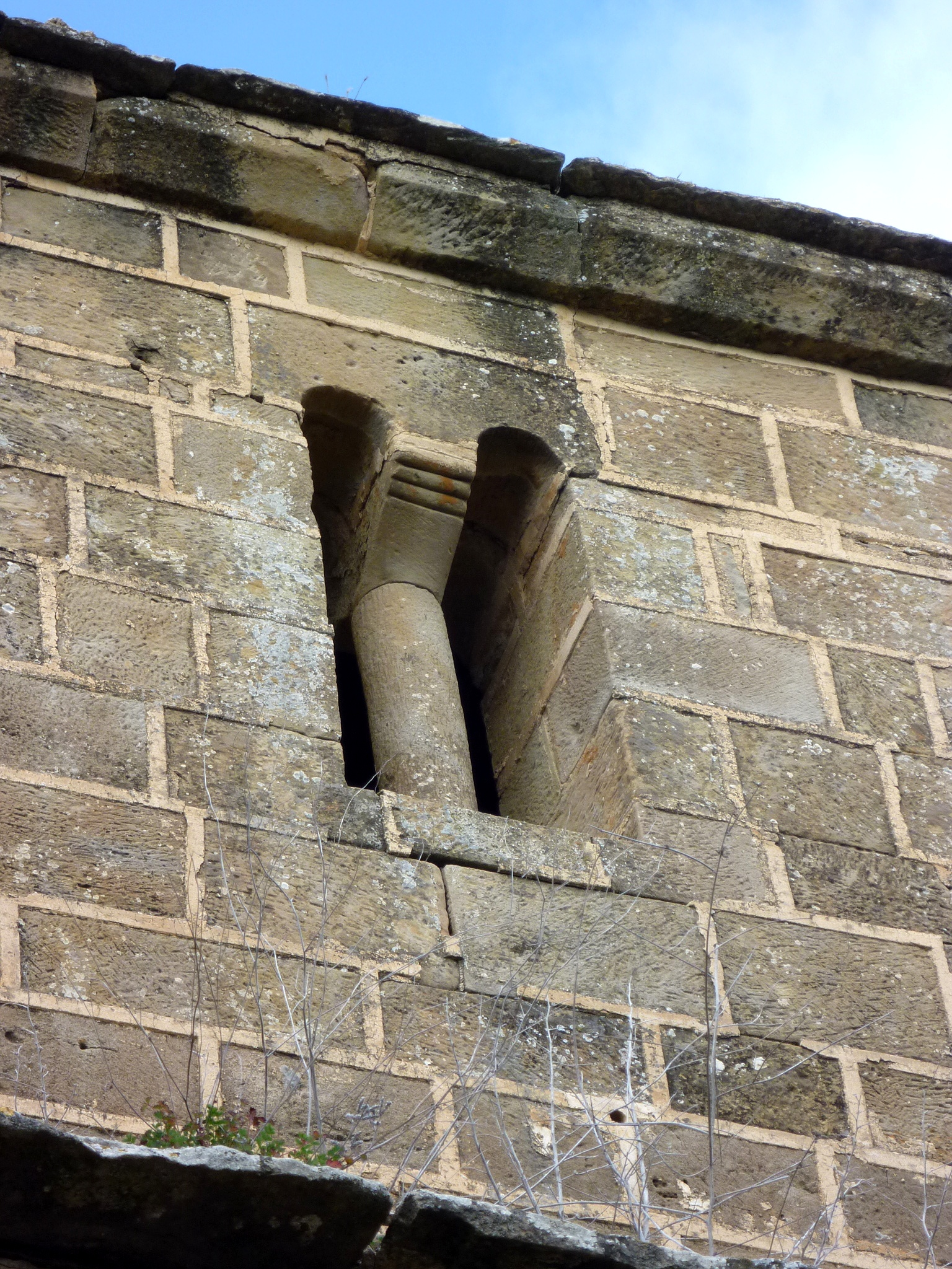 Església de Santa Maria de la Serra de Castellar (Oliola): una de les finestres geminades de la torre o campanar